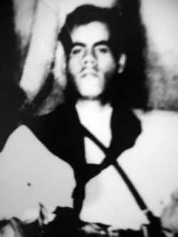 Amnistia ante el jefe de la zona militar general Genovevo Rivas Guillén, así como con los coroneles Marcelino García Barragán y Juan de la Torre Villalvazo.